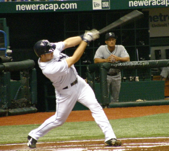 Shawn Riggans